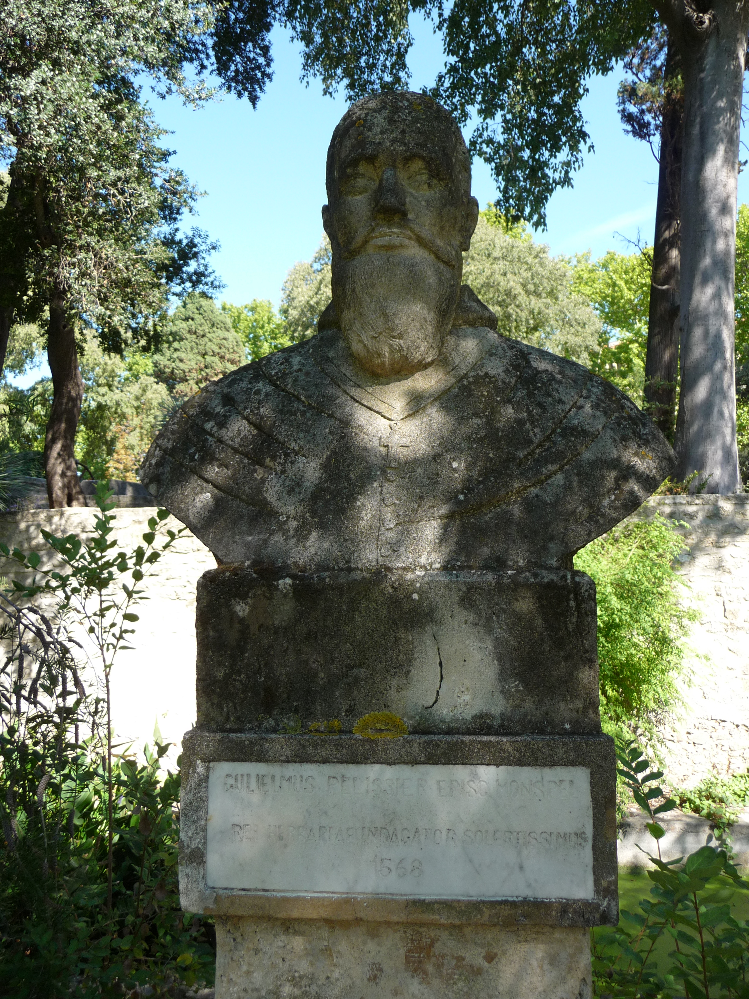 Bust de Guillaume Pellicier al Jardí Botànic de Montpeller .